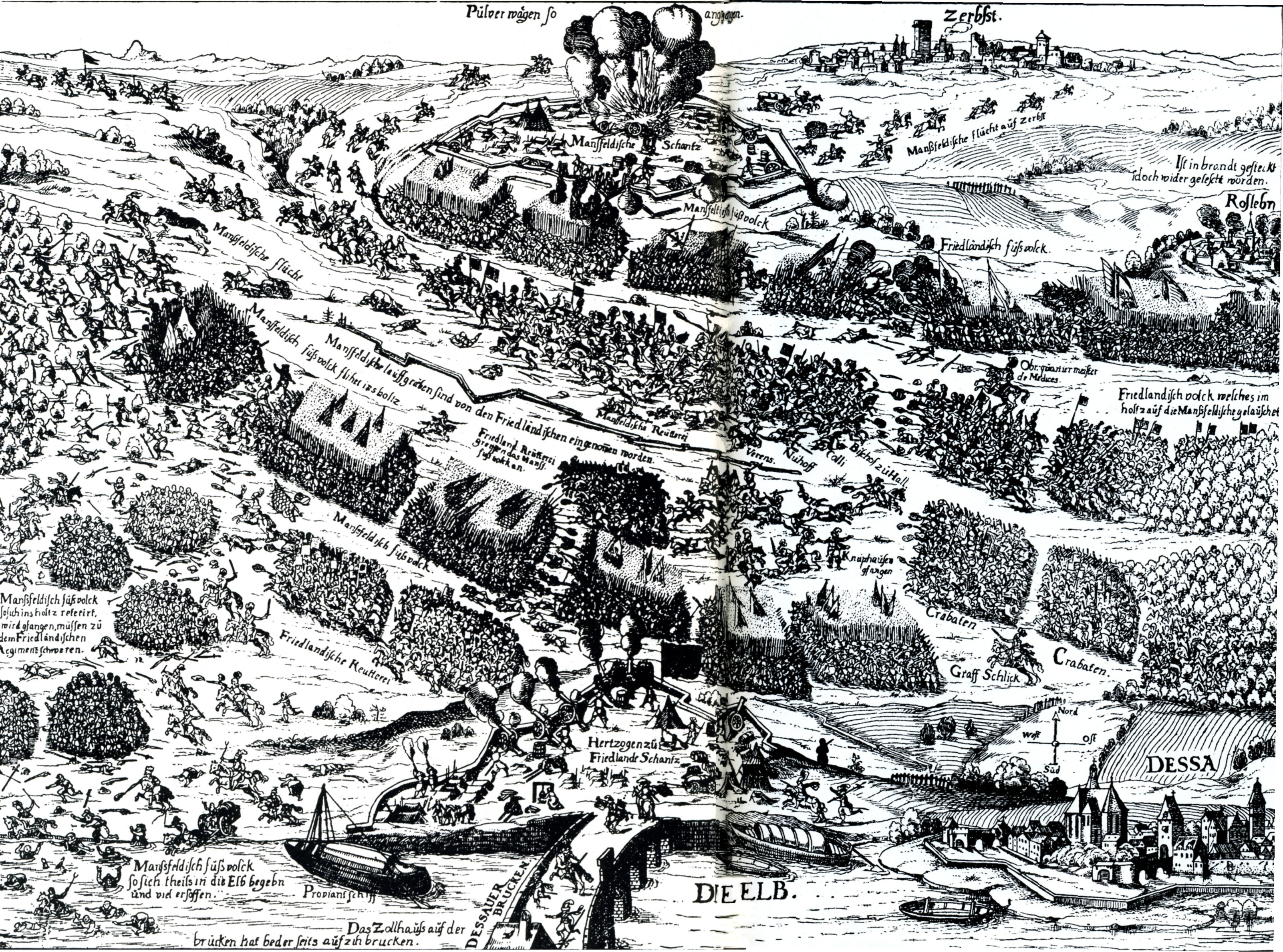 Einblattdruck mit der Beschreibung der Schlacht bei Dessau am 25. April 1626, Transkription des zugehörigen Textes: Abbildung neben kurtzem Bericht welcher gestalt der Hertzog zu Friedland die Manßfeldische Armee von der Elbbrucken zu Dessa abgetrieben